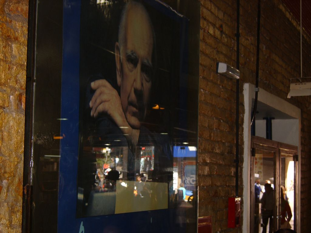 Pôster de Érico Veríssimo dentro da Livraria do Globo, em Porto Alegre, Brasil. Setembro de 2006, trabalho próprio